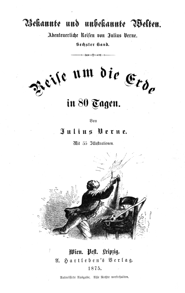 Titelblatt von: Jules Verne: Reise um die Erde in 80 Tagen. Bekannte und unbekannte Welten. Abenteuerliche Reisen von Julius Verne, Band VI, Wien, Pest, Leipzig: A. Hartleben, 1875.